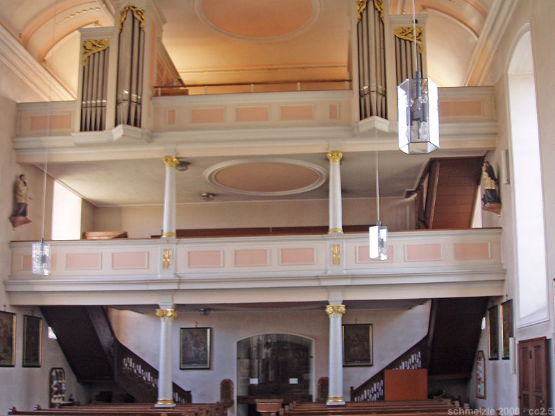 Empore der kath. Kirche St. Michael in Erlenbach-Binswangen